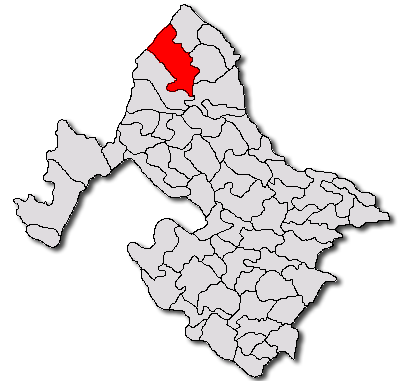 Categorie:Hărţi ale judeţului Mehedinţi